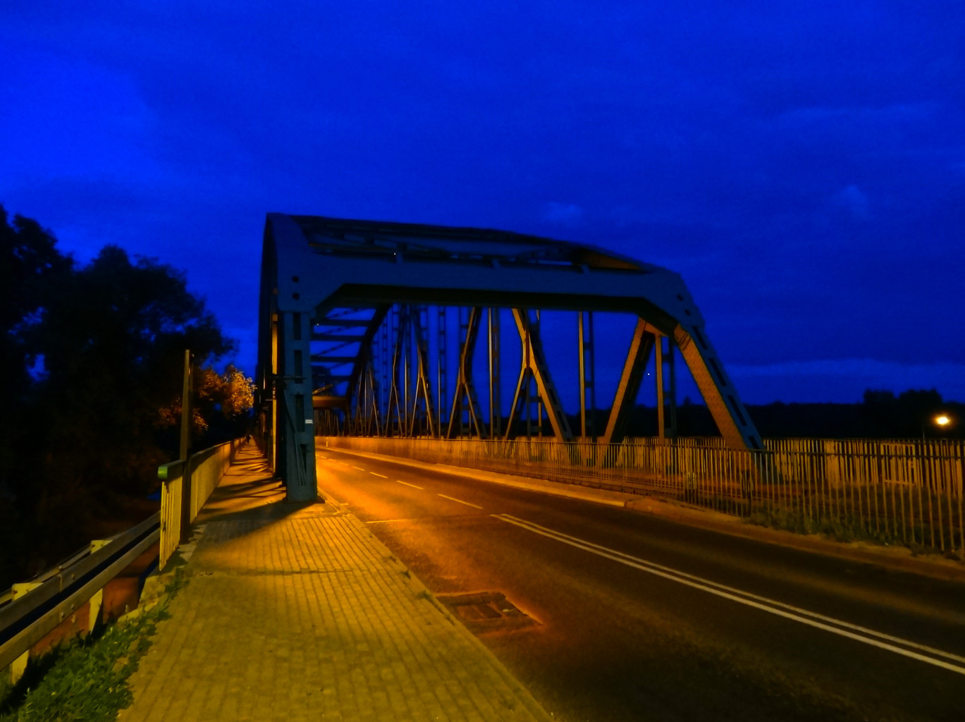 Most fordoński im. Rudolfa Modrzejewskiego nad Wisłą w Bydgoszczy-Fordonie